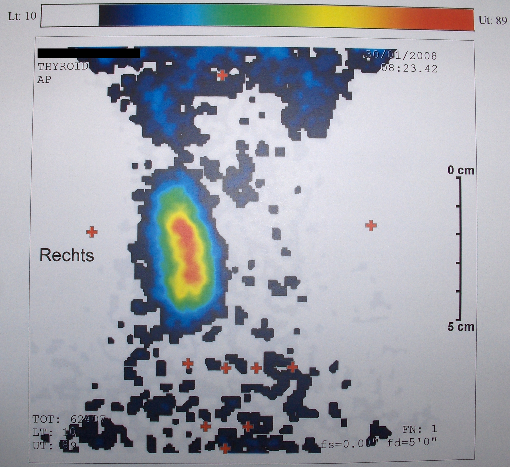 Szintigramm der Schilddrüse nach Hemithyreoidektomie links